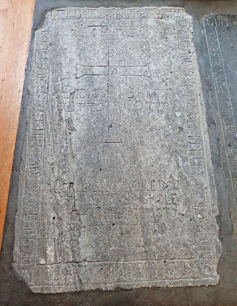 Gravhäll över barn till bergsfogden Aegidius Otto i Arjeplogs kyrka.